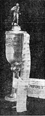 Campaonato de Honor 1938